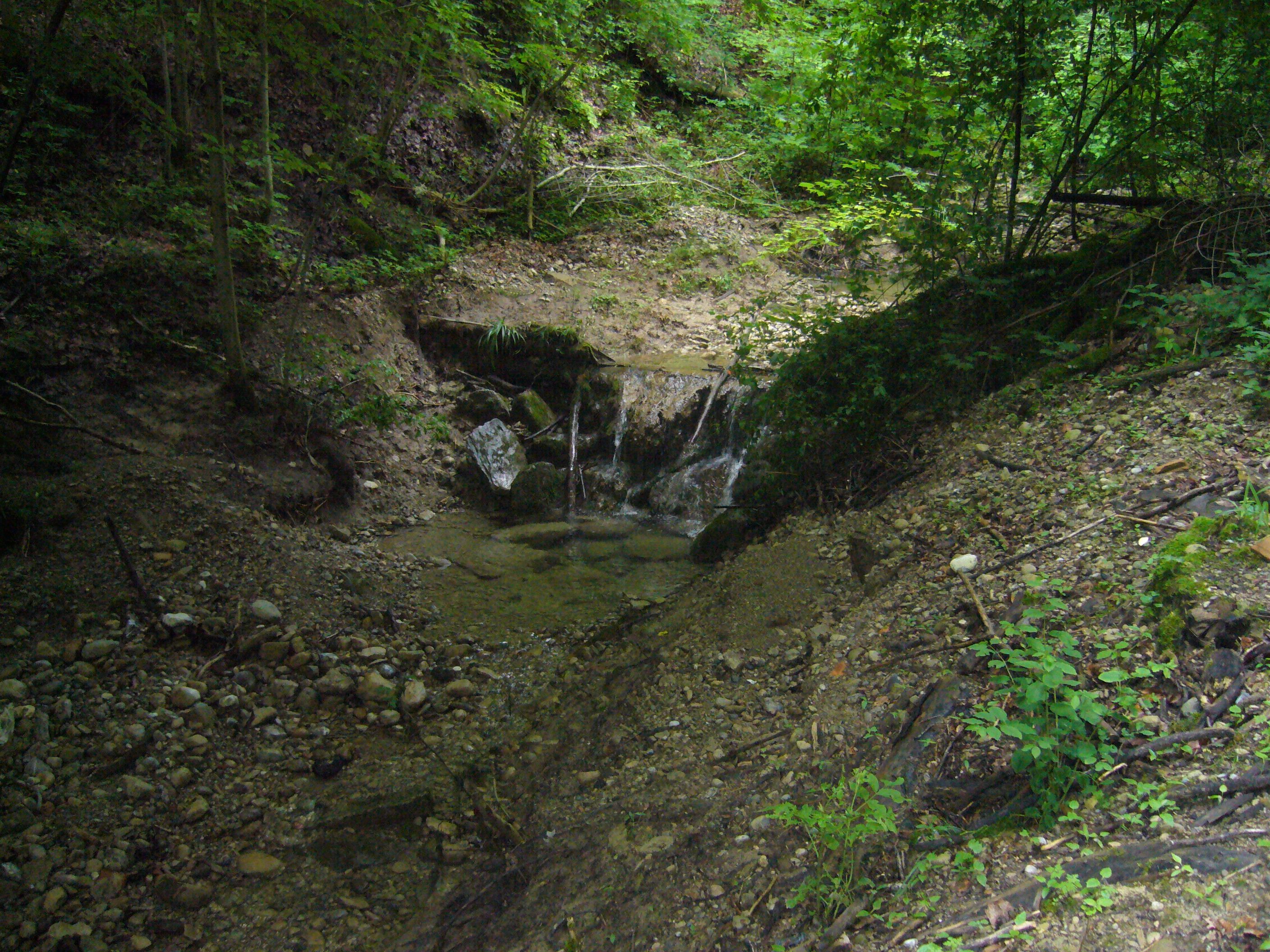 Wasserfall im Hubackertobel (Name auf der Siegfriedkarte. Heute fliesst dort der Jungholztobelbach - Name des Steigbach auf Gemeindegebiet von Brütten) zwischen Brütten und Winterthur.